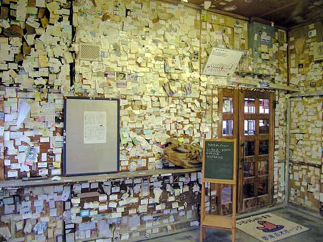 北浜駅待合室。 日本各地から来た観光客等の名刺や定期券が貼ってある。 撮影場所 北浜駅待合室。